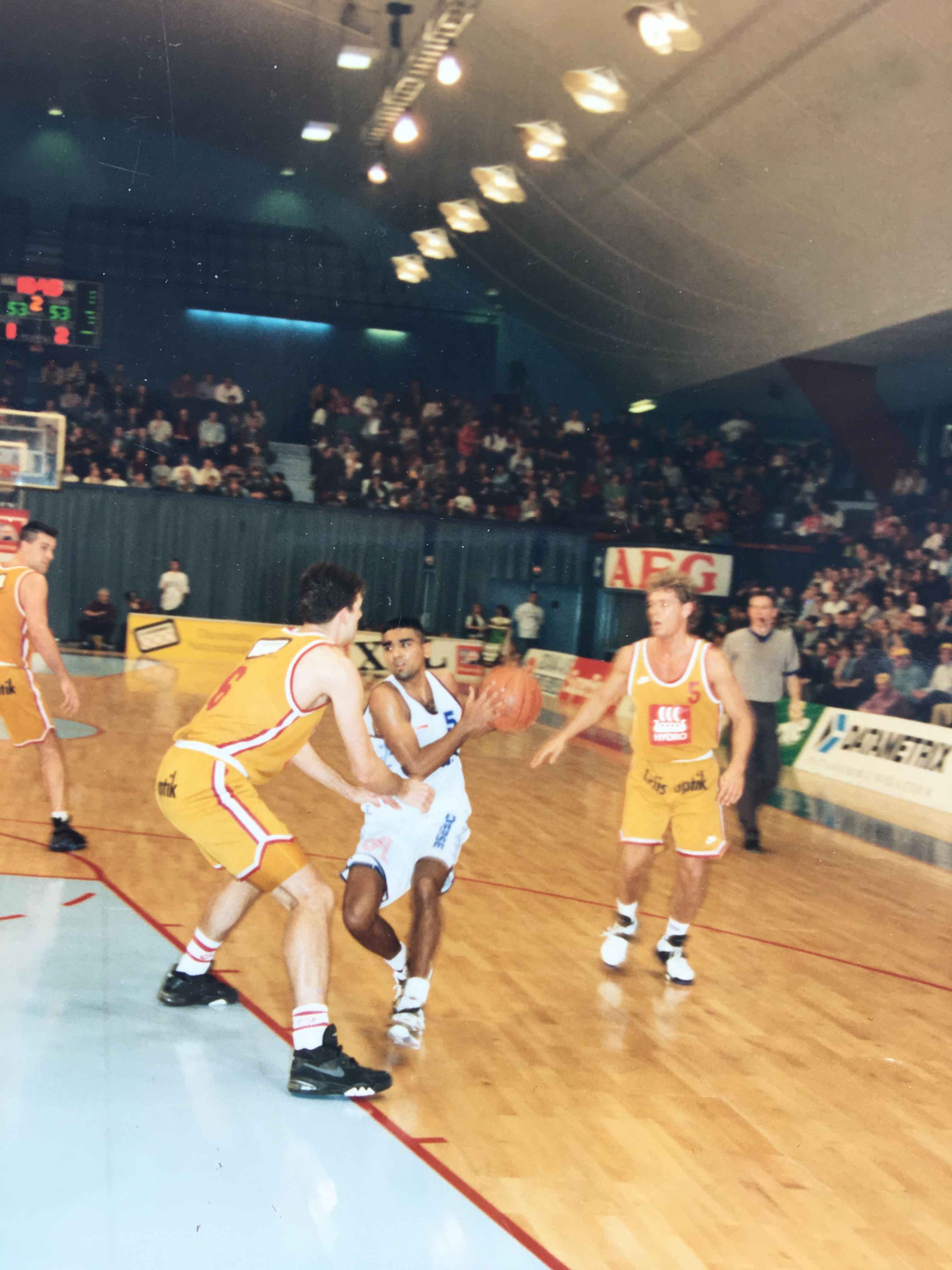 Stevnsgade mod Horsens IC (ca.1993)